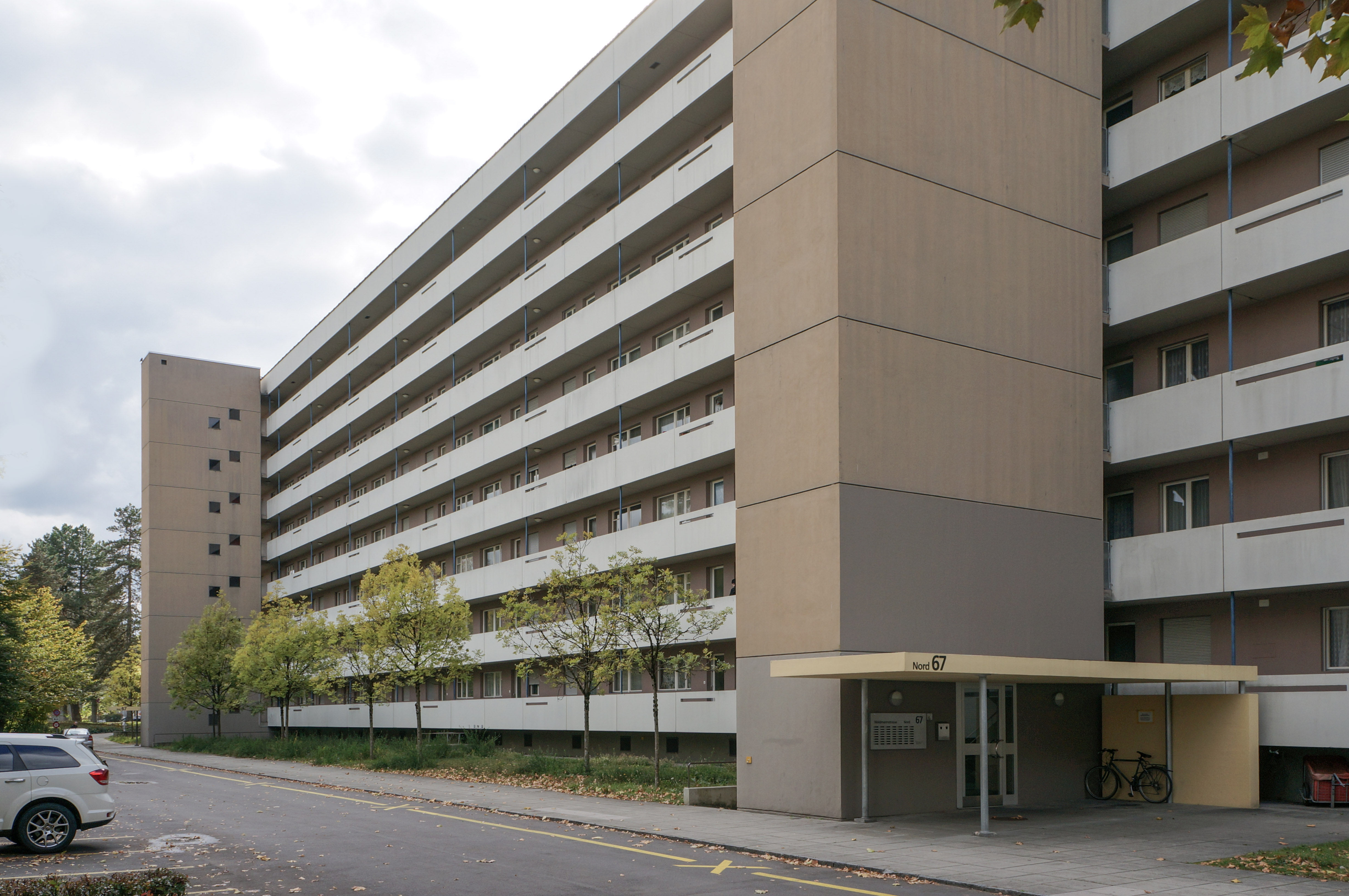 Überbauung Tscharnergut, Scheibenhaus mit zwei Erschliessungstürmen und Laubengängen zu den Wohnungen, Juni 2017.